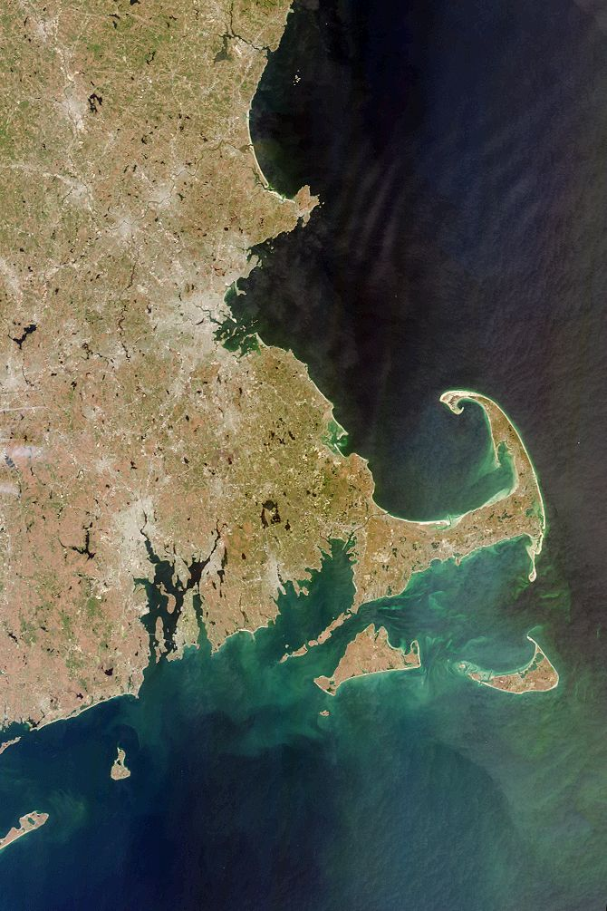 Cape Cod